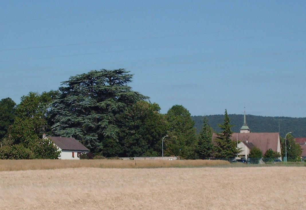 Entrée du village depuis Domois